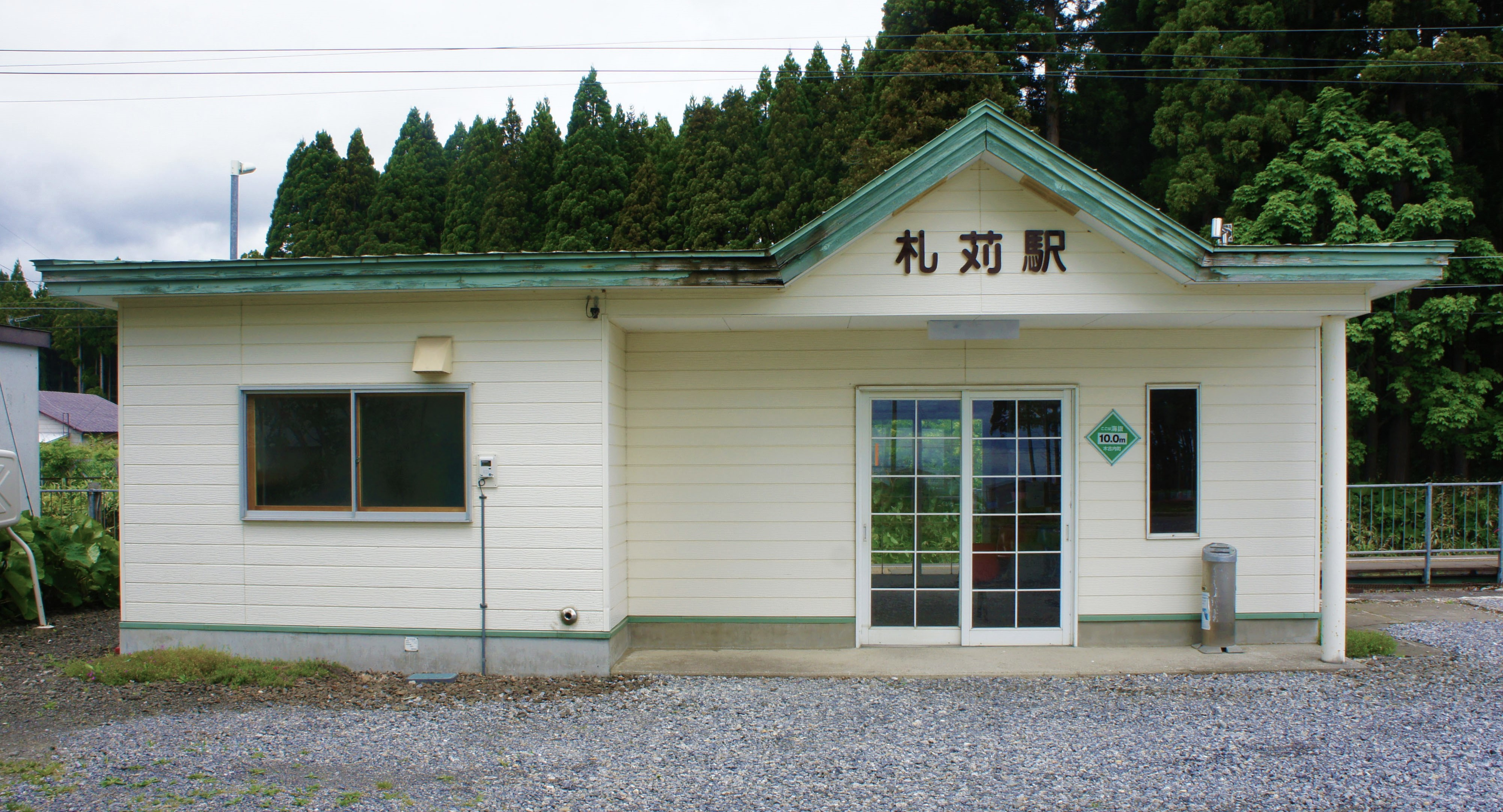 道南いさりび鉄道線・札苅駅の駅舎